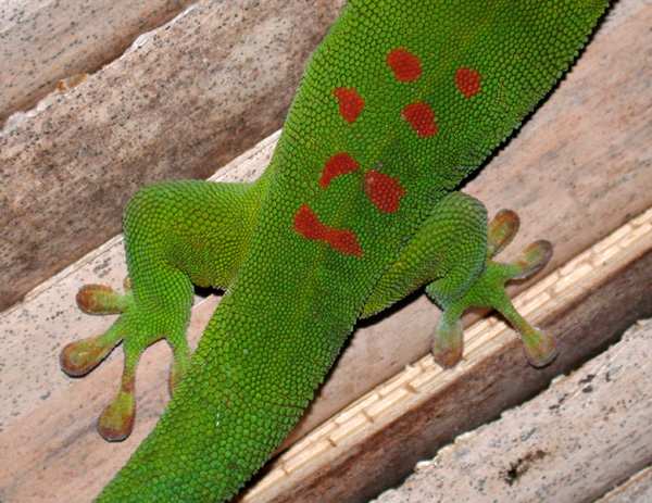 Madagascar day gecko (Phelsuma madagascariensis madagascariensis)